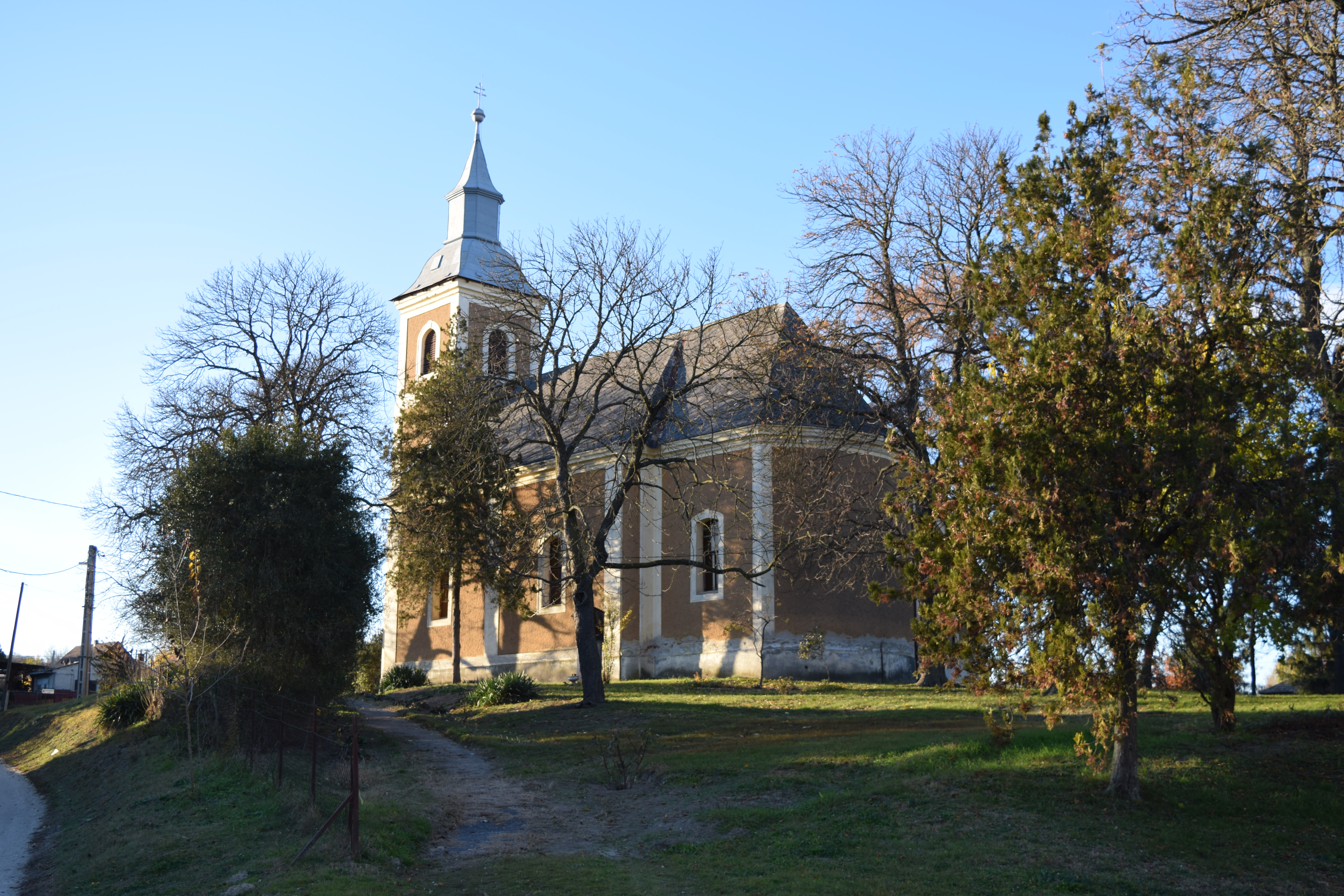 1763-ban épült, 1880-ban felújított.